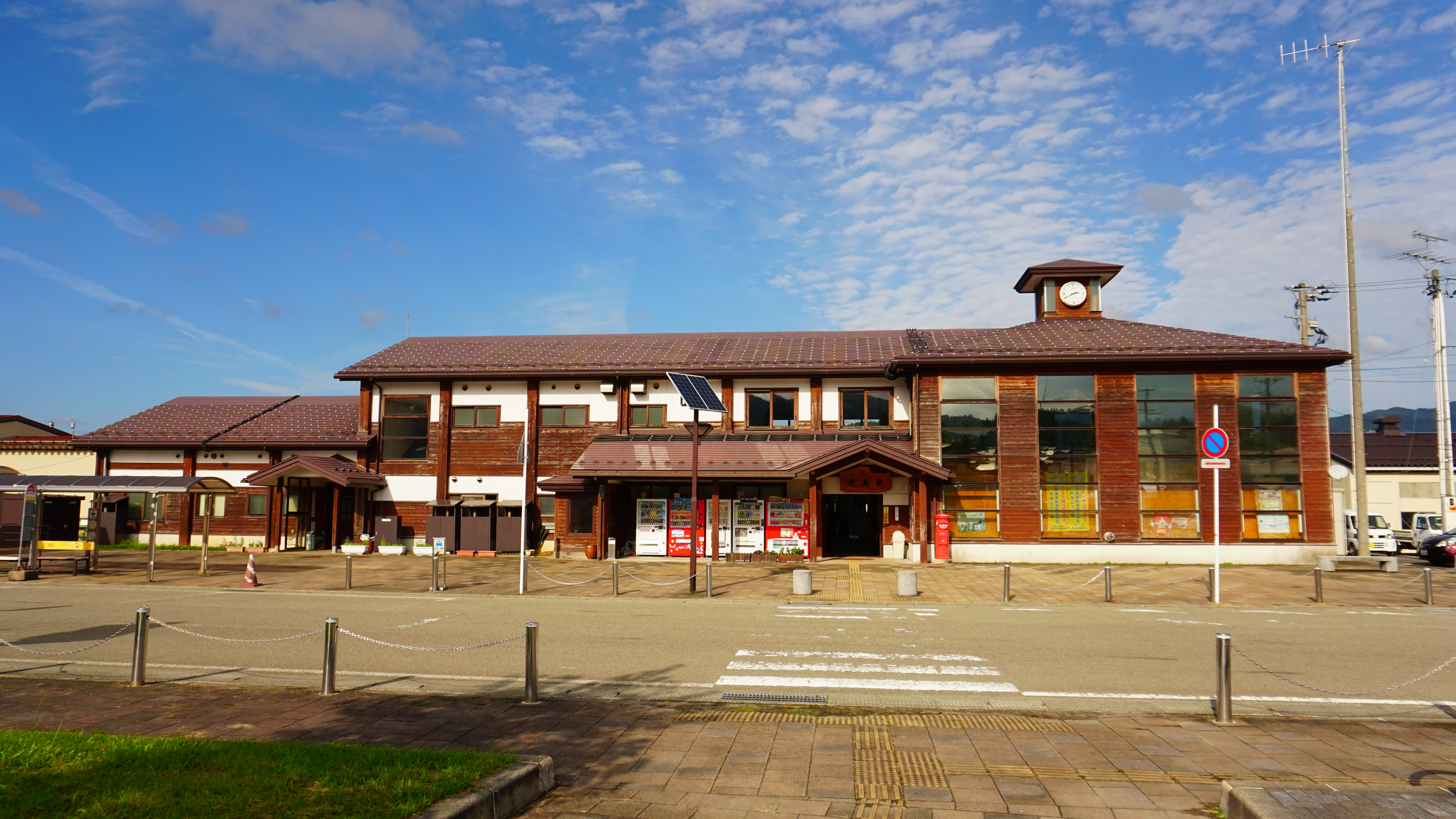 由利高原鉄道 矢島駅（秋田県由利本荘市矢島町）